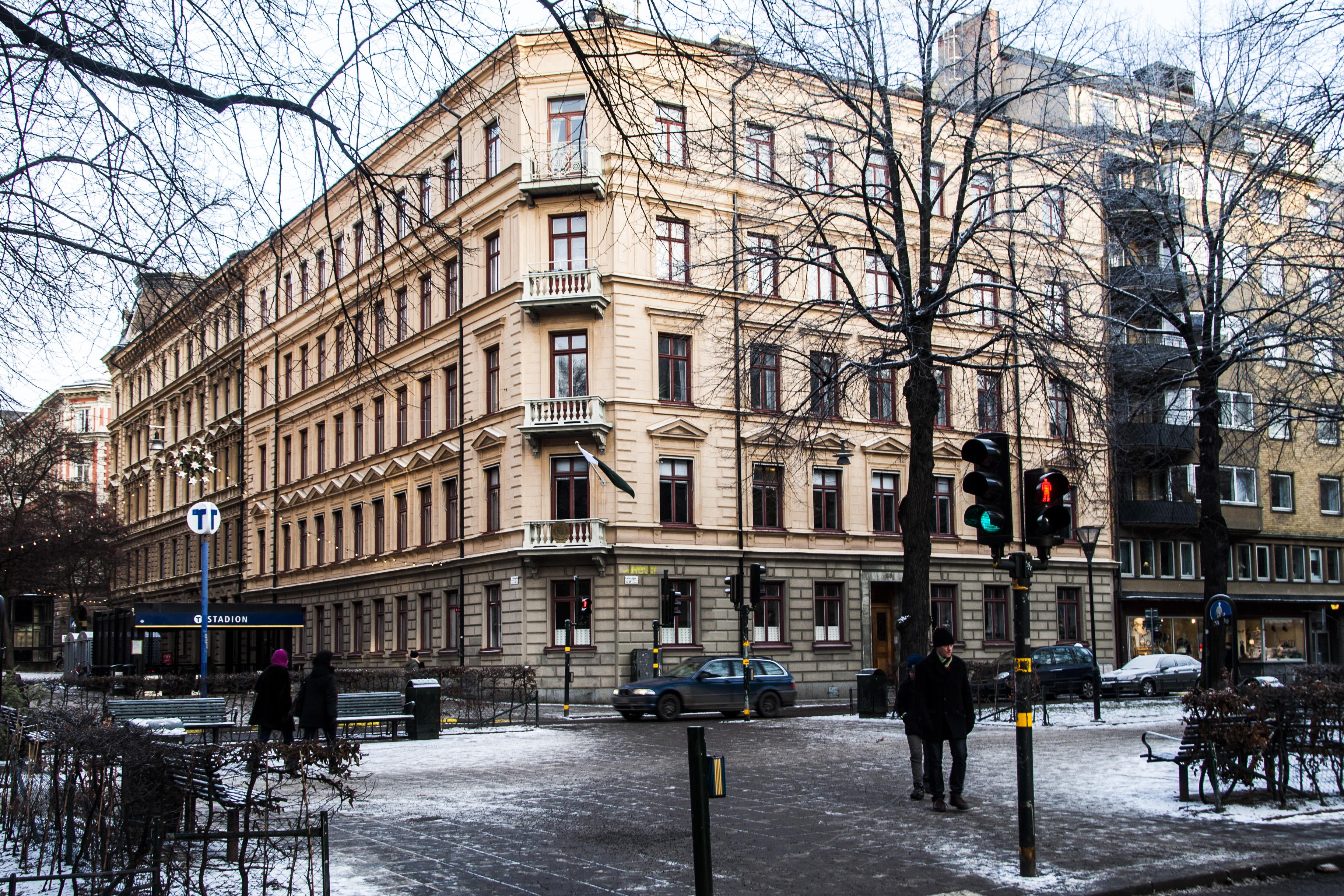 Pakistans Ambassad i Stockholm Ekorren 17, Karlavägen 65, Nybrogatan 52 Nybyggnadsår 1880 - 1881 Carl Henric Hallström (Byggmästare) C. W. Rinman (Byggmästare) E. Löfgren (Byggherre) Kumlien Axel & Kumlien Hjalmar (Arkitekt)